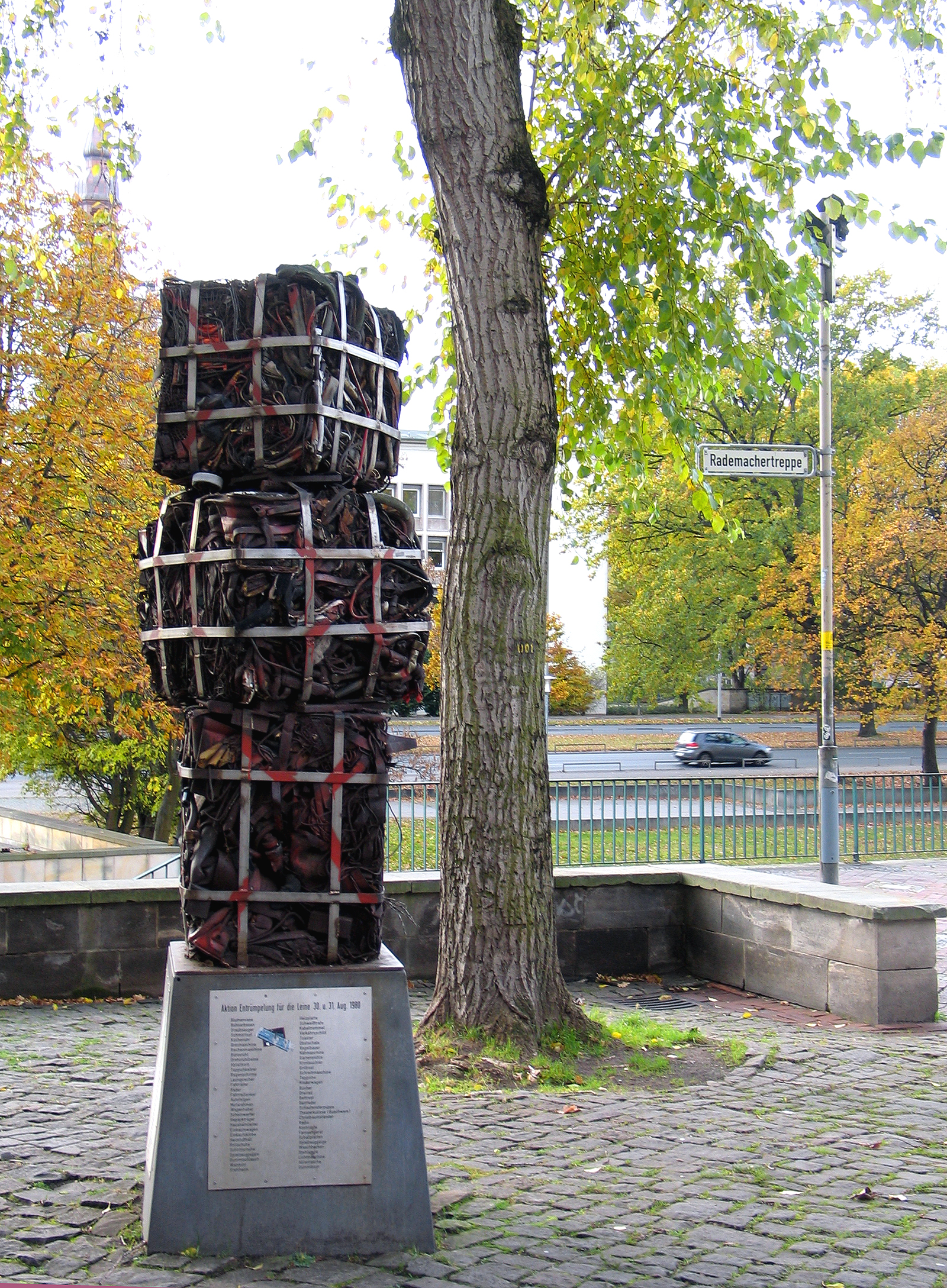 János Nádasdys "Denkmal für Kurt Schwitters und Karl Jakob Hirsch", gesehen vom Klostergang in Richtung Leibnizufer ...